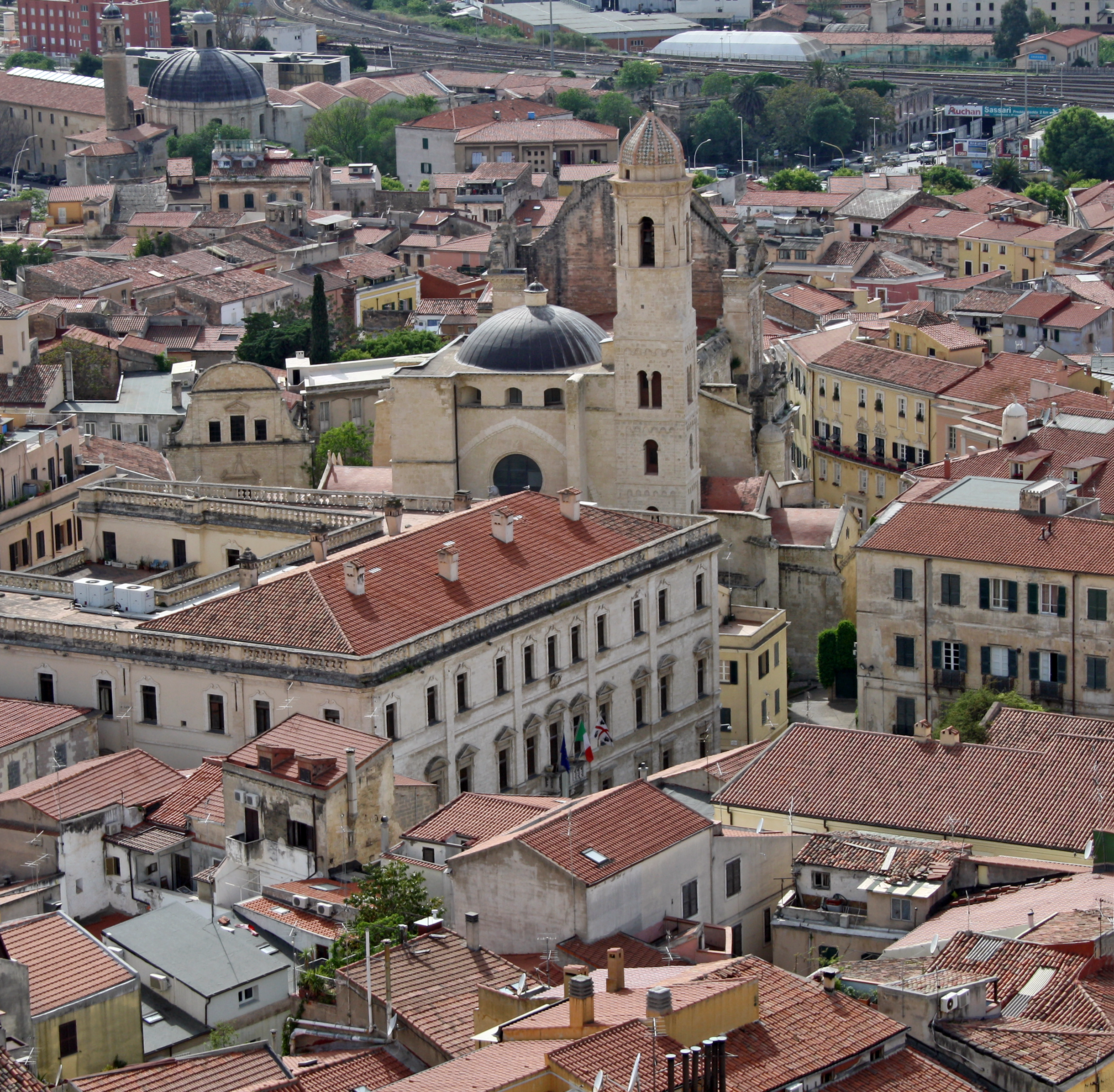 Veduta del centro storico di Sassari dal Grattacielo Nuovo